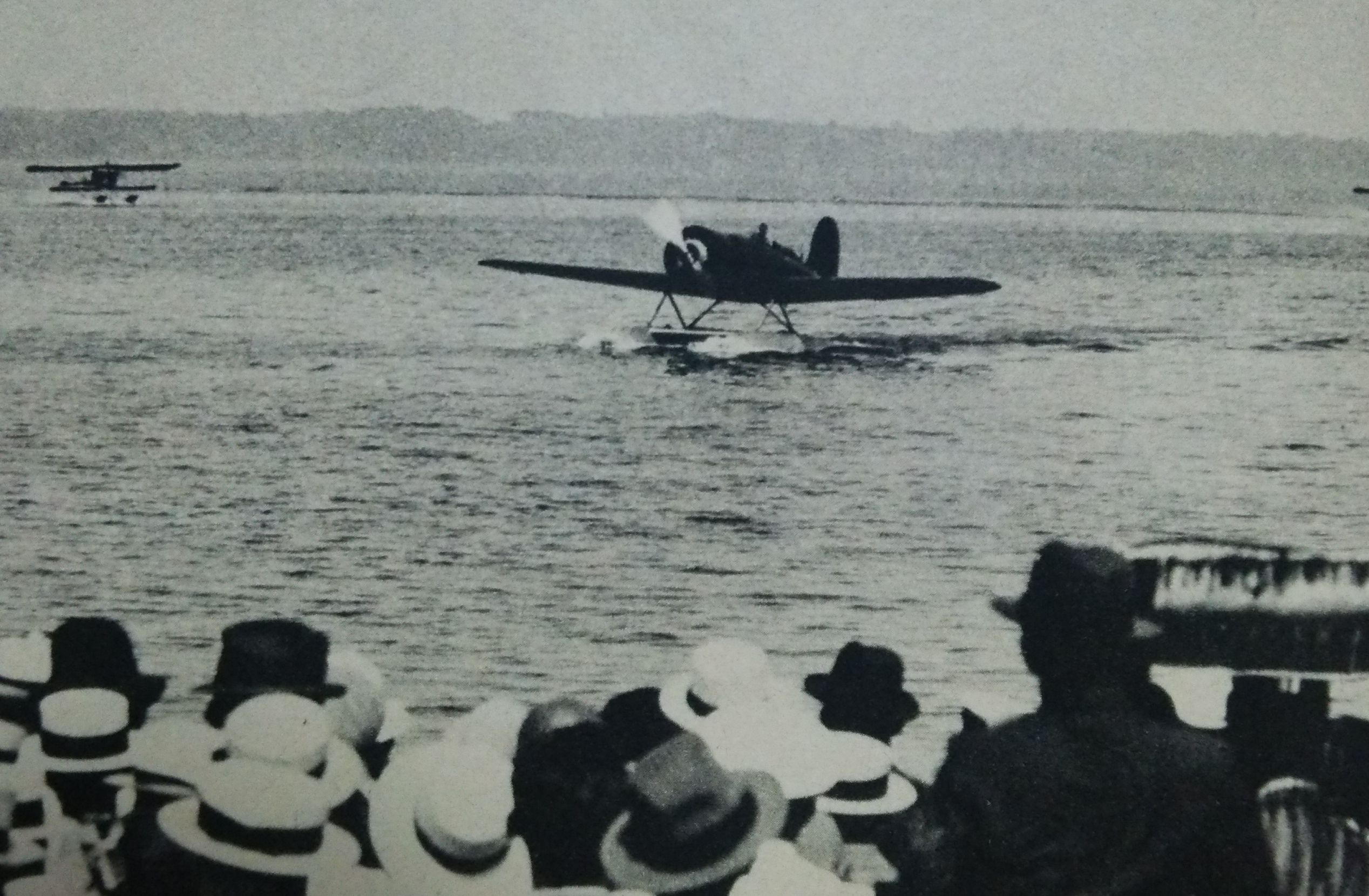 日本でのチャールズ・リンドバーグ